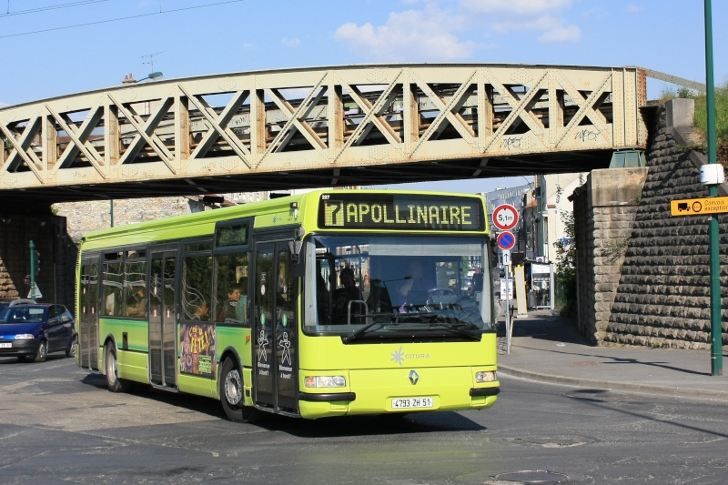 Agora S du réseau Citura sur la ligne 7 au Pont d'Épernay